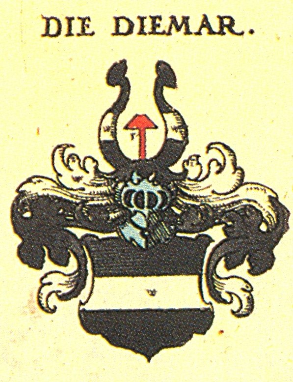 Ritterschaft und Adel in Franken Die Diemar